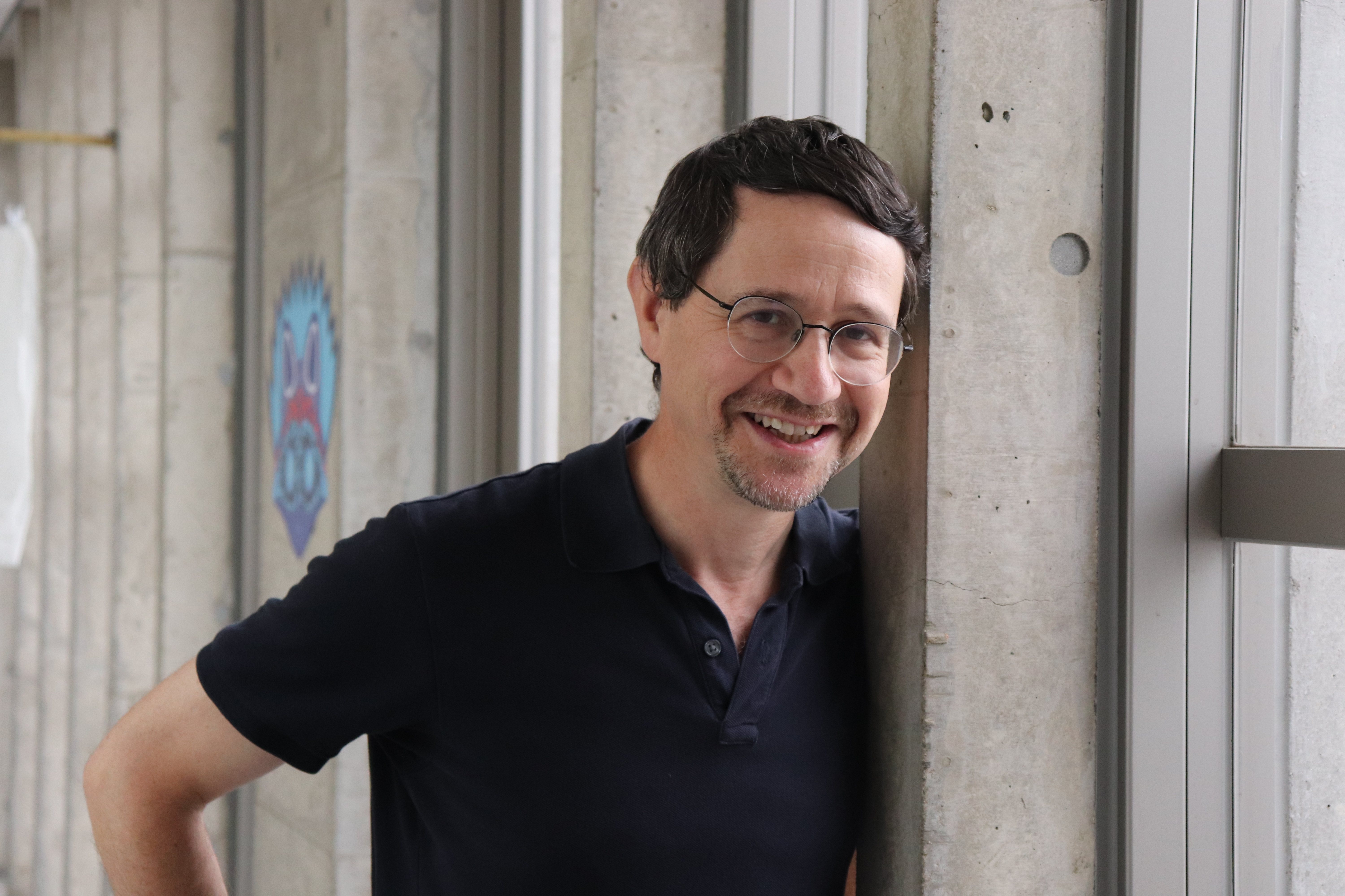 Arnaud Rykner durant sa résidence à la Villa Kujoyama, juin 2019 ©Villa Kujoyama